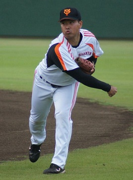 Giants_amemiya_021